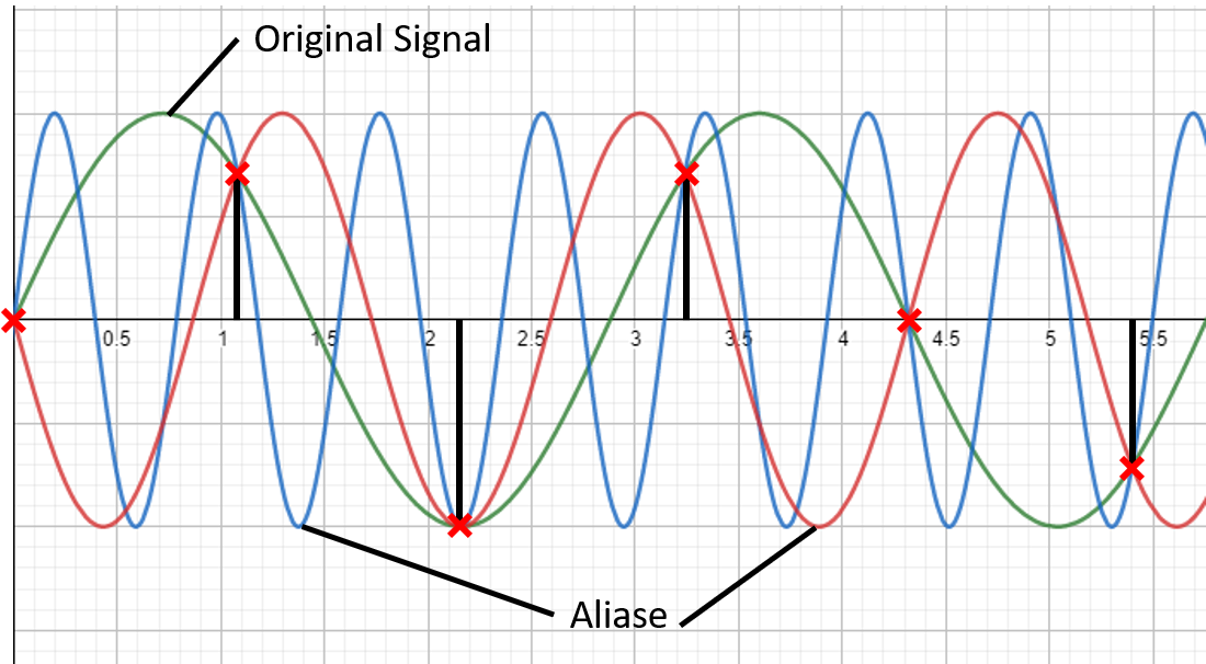 中文（台灣）: 均勻取樣造成的訊號混疊